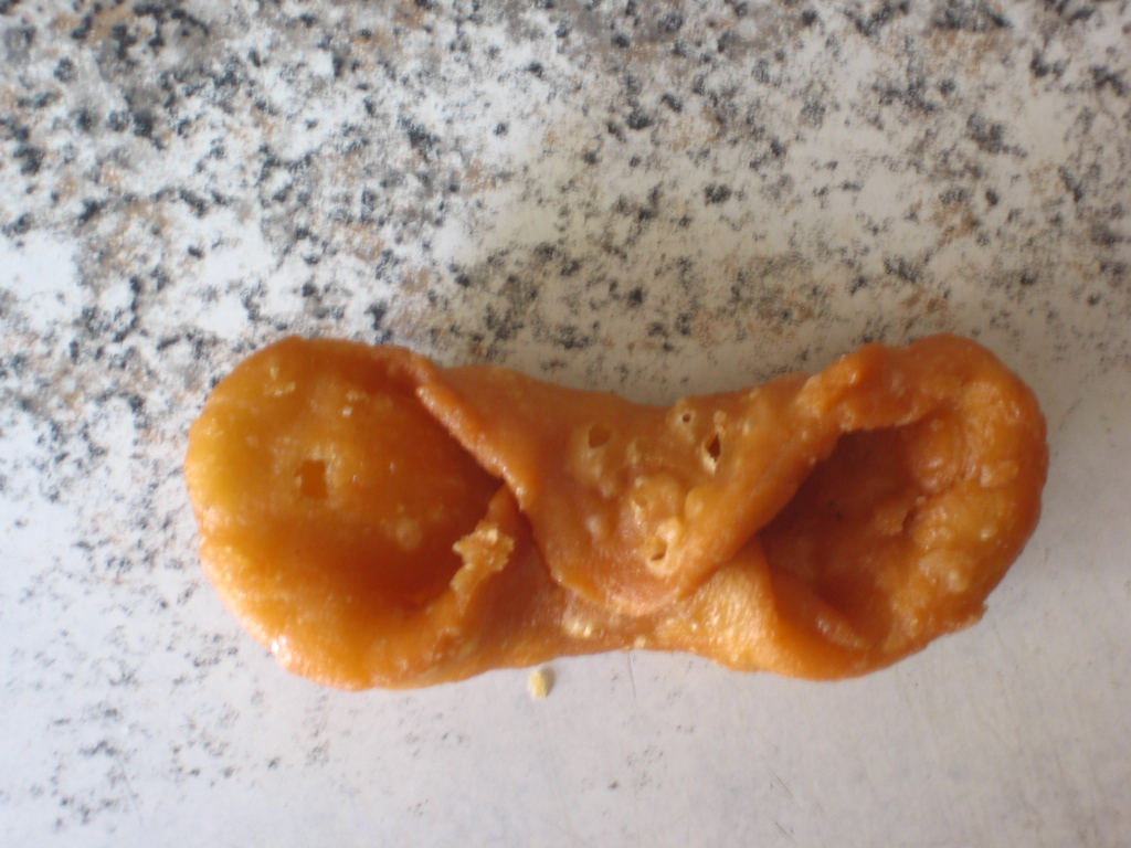 Pestinno, dulce popular